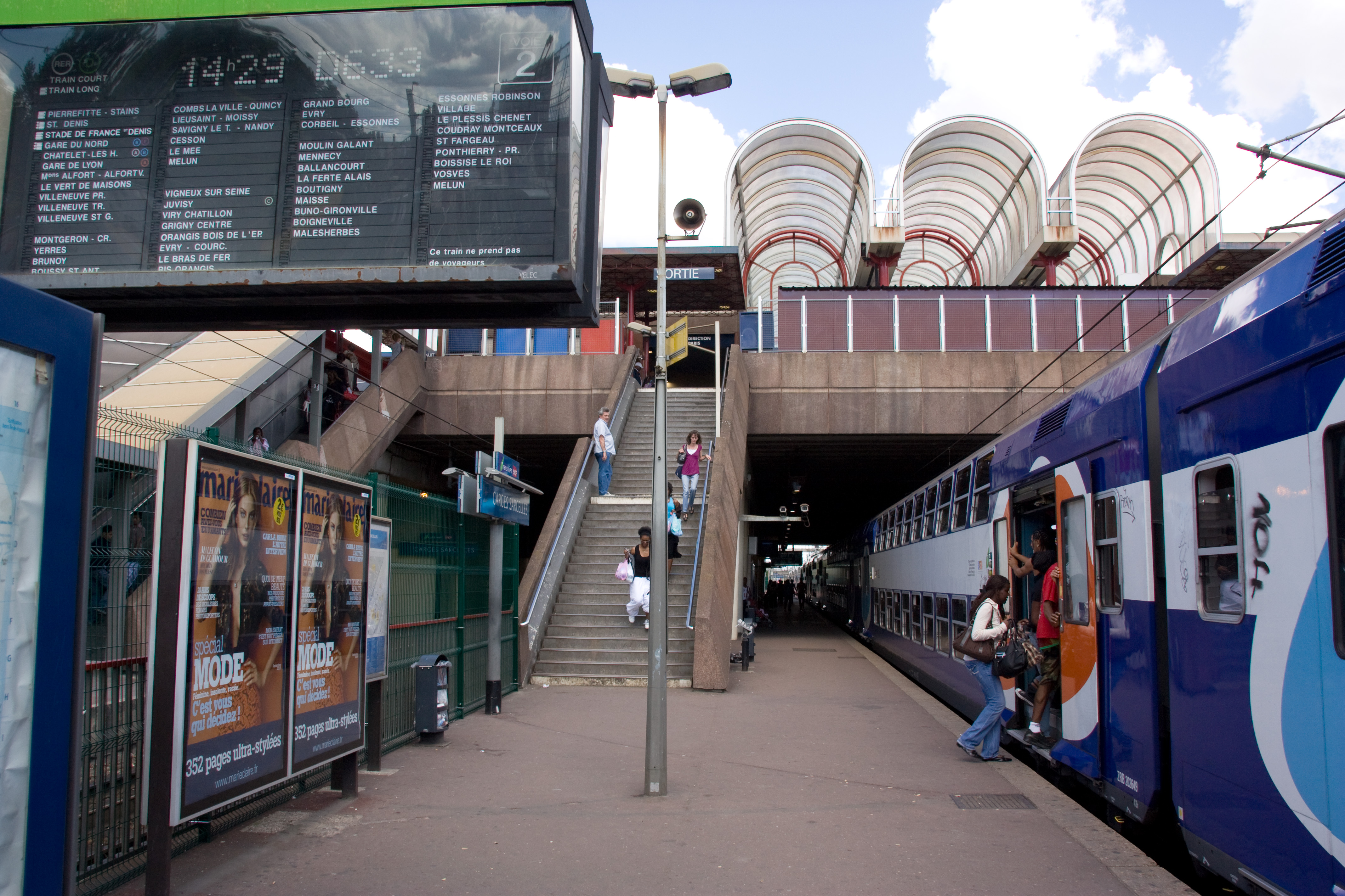 La Gare de Garges - Sarcelles, département du Val-d'Oise, France